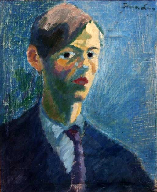 blue